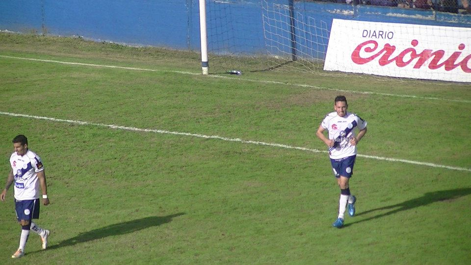 Vara en Deporivo Merlo